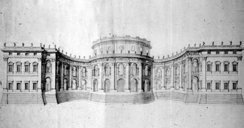 проект добудов Лувру(?), варіант